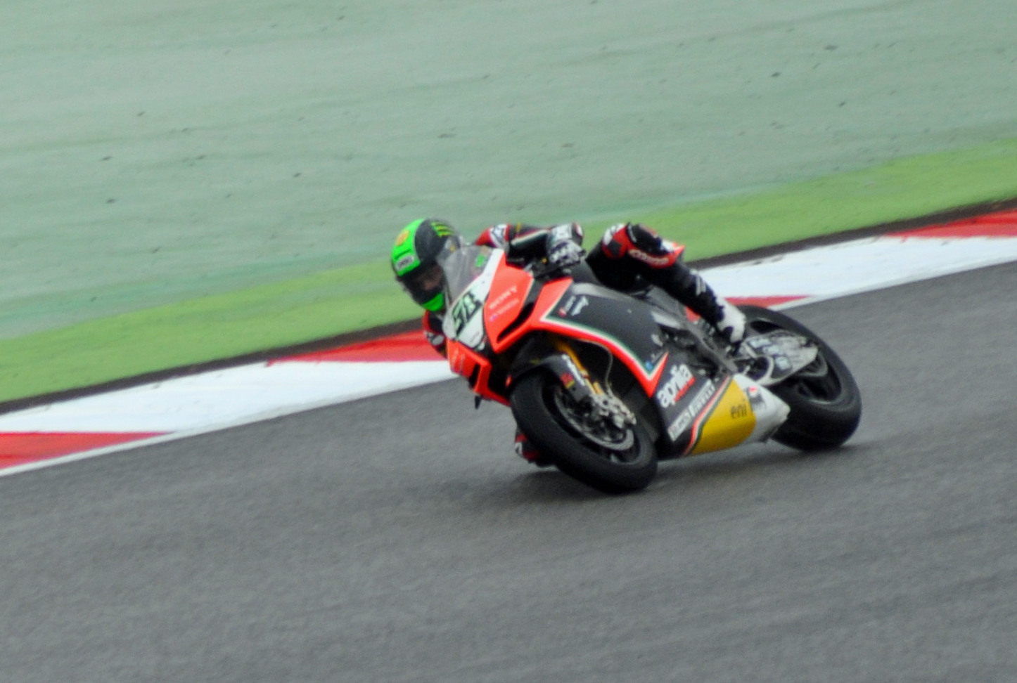 Autódromo Internacional do Algarve (2012-09-23), by Klugschnacker in Wikipedia (19) Eugene Laverty (IRL) auf Aprilia